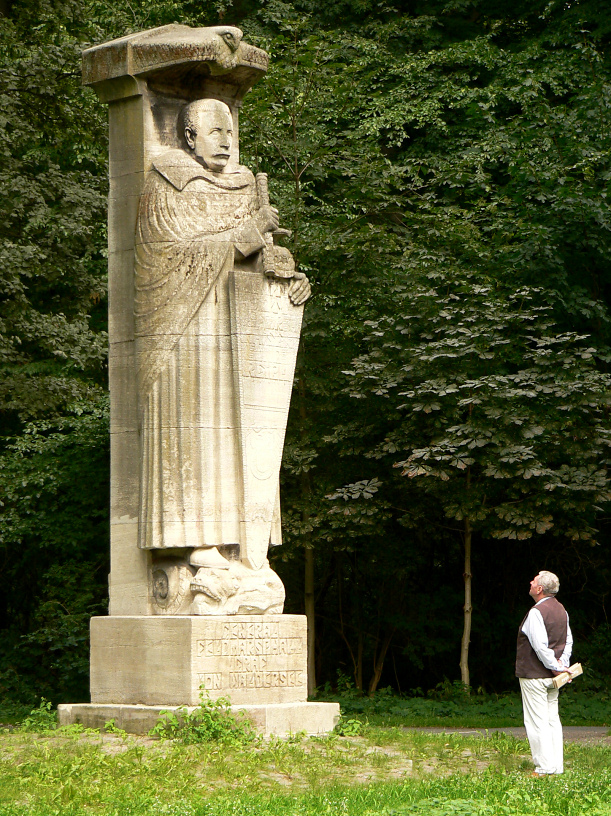 Waldersee-Denkmal für Alfred Graf von Waldersee am Rande der Eilenriede in Hannover Bild ist nicht gestellt, zufälliger Passant